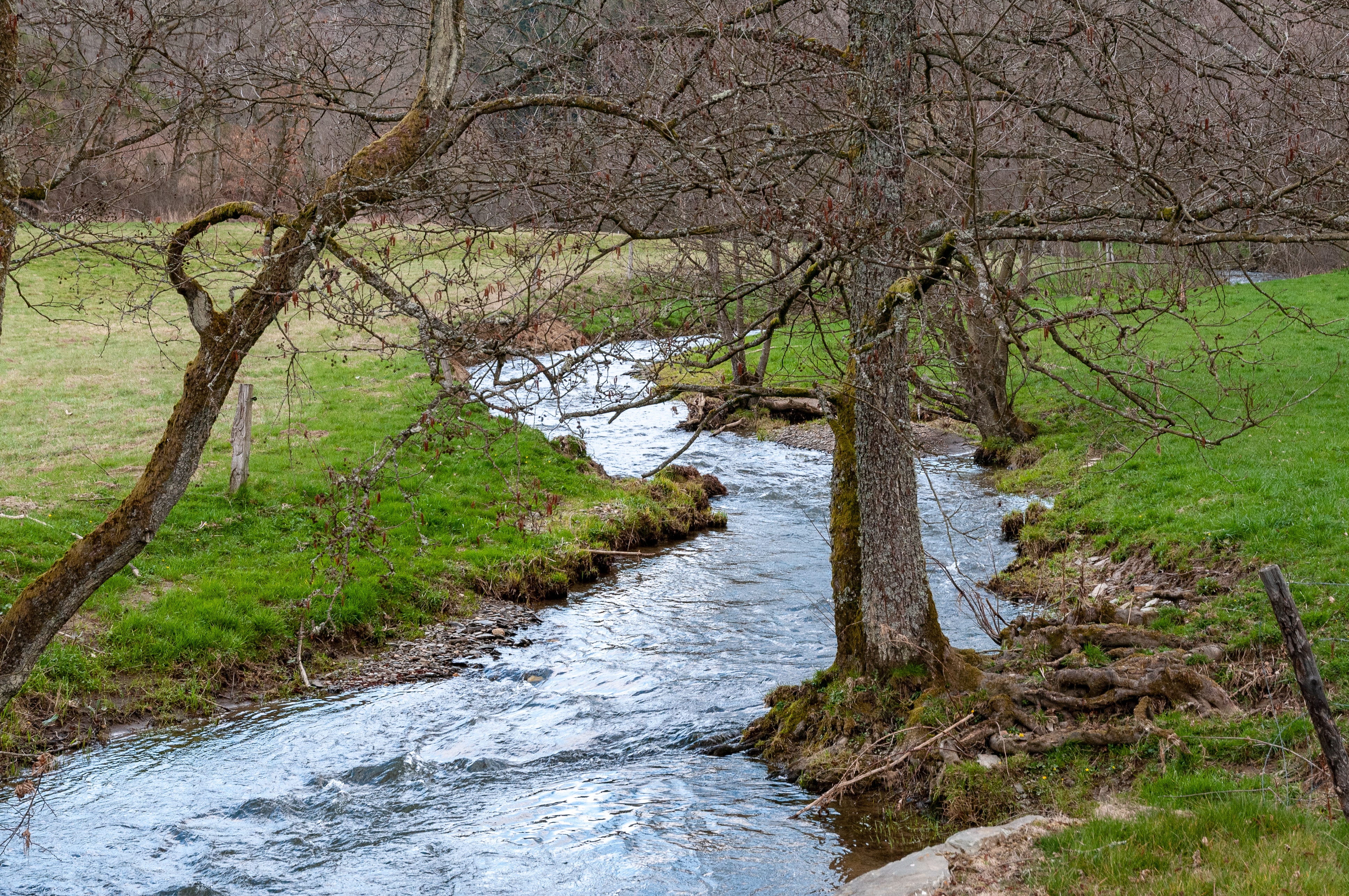 Zu Bauschelt mécht d'Syrbaach kuerz d'Grenz mat der Belsch ier se bei der Gossemaark LB176 an d'Sauer leeft.